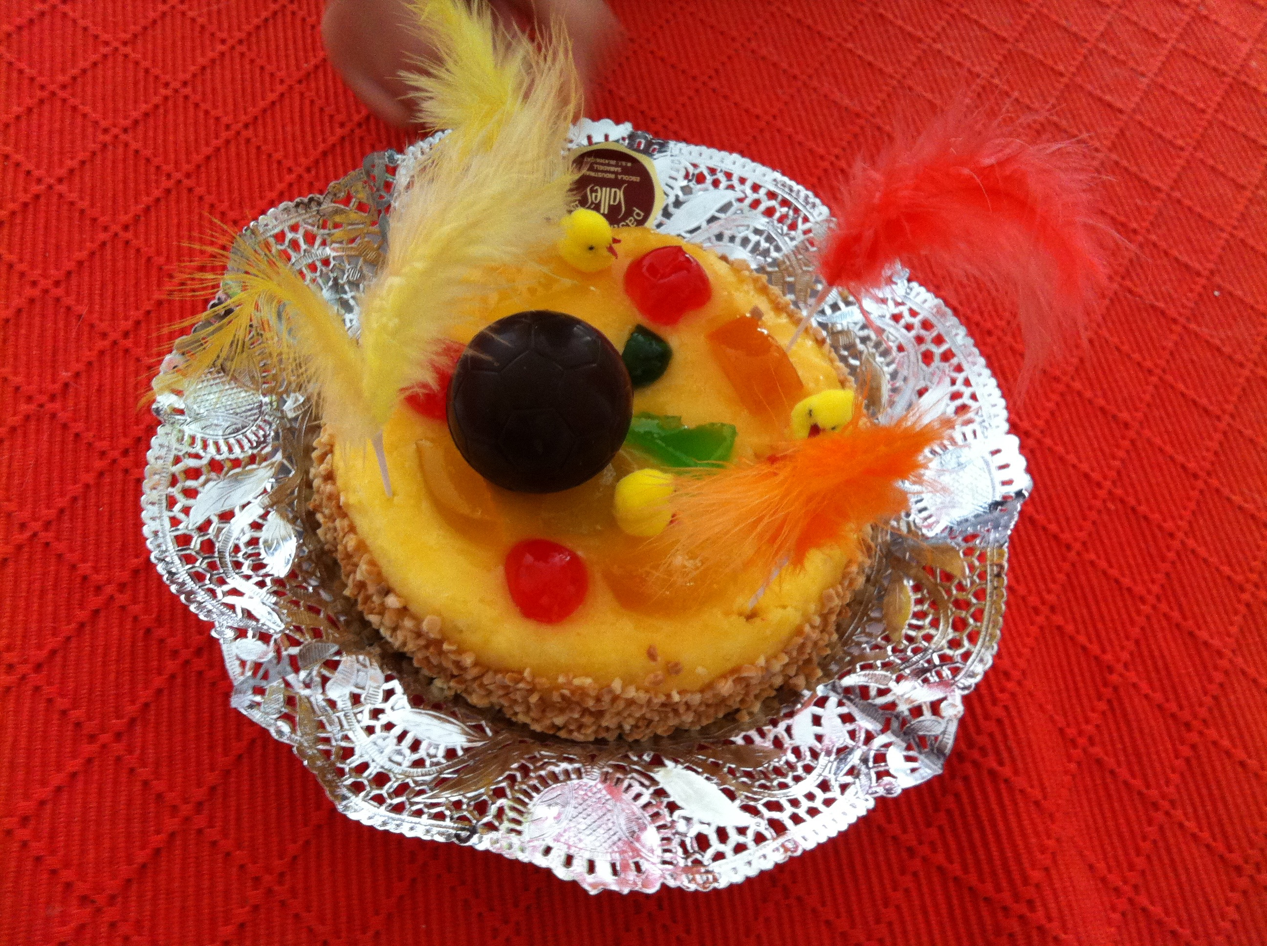 Mona 2014